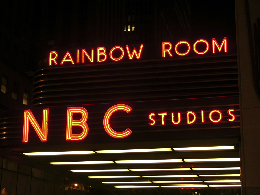 Foto taget i maj 2005 av Thomas Evensson